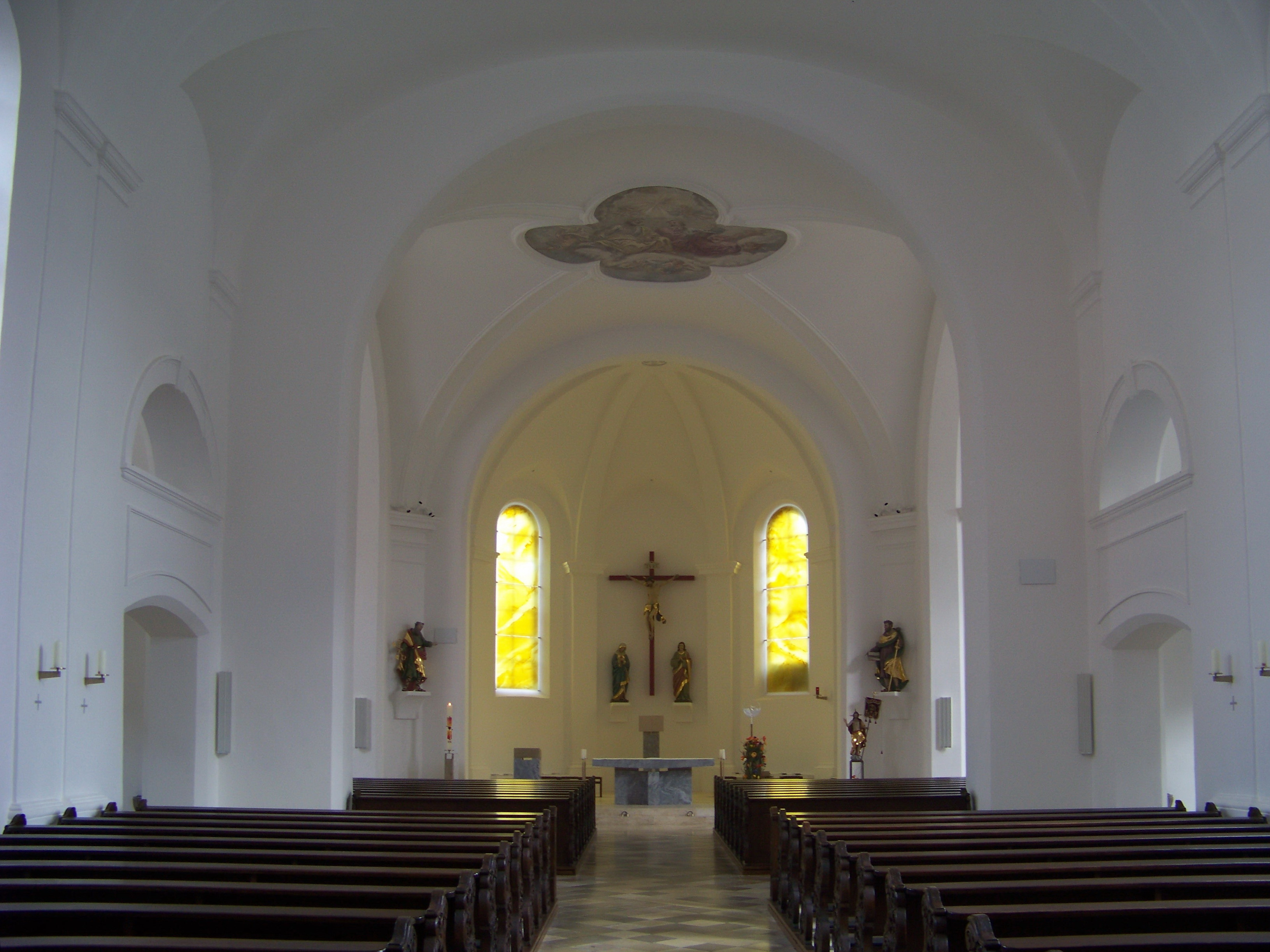 Ergoldsbach, Hauptstraße 18. Katholische Pfarrkirche St. Peter und Paul. Saalkirche mit erweitertem Querhaus und Westturm, erbaut 1729, Chor und Querhaus 1886/87, Gliederung durch Lisenen und Dachfries sowie Putzbänderung. Innenraum nach der Renovierung 2015-2016. Der gesamte Innenraum ist weiß ausgemalt. Der Chorraum wird durch die farbigen Fenster in gelbes Licht getraucht. Die Beleuchtung erfolgt über Deckenstrahler im Gewölbe. Das Kirchengestühl ist dunkel gestrichen.